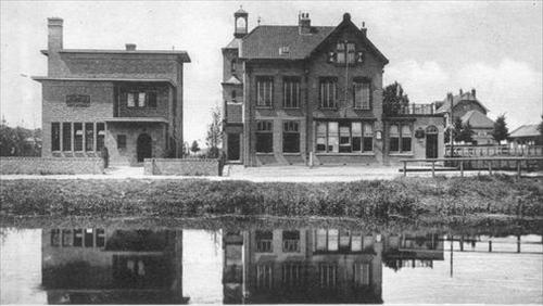 Rechts het oude postkantoor en links het bankgebouw van Van Loghem aan de Hoofdvaart te Hoofddorp. Het postkantoor dateert uit de 19e eeuw/begin 20ste eeuw, het bankgebouw van Van Loghem is van 1917. Het postkantoor is gesloopt en heeft plaats gemaakt voor een modern kantorgebouw. Het bankgebouw staat er nog.